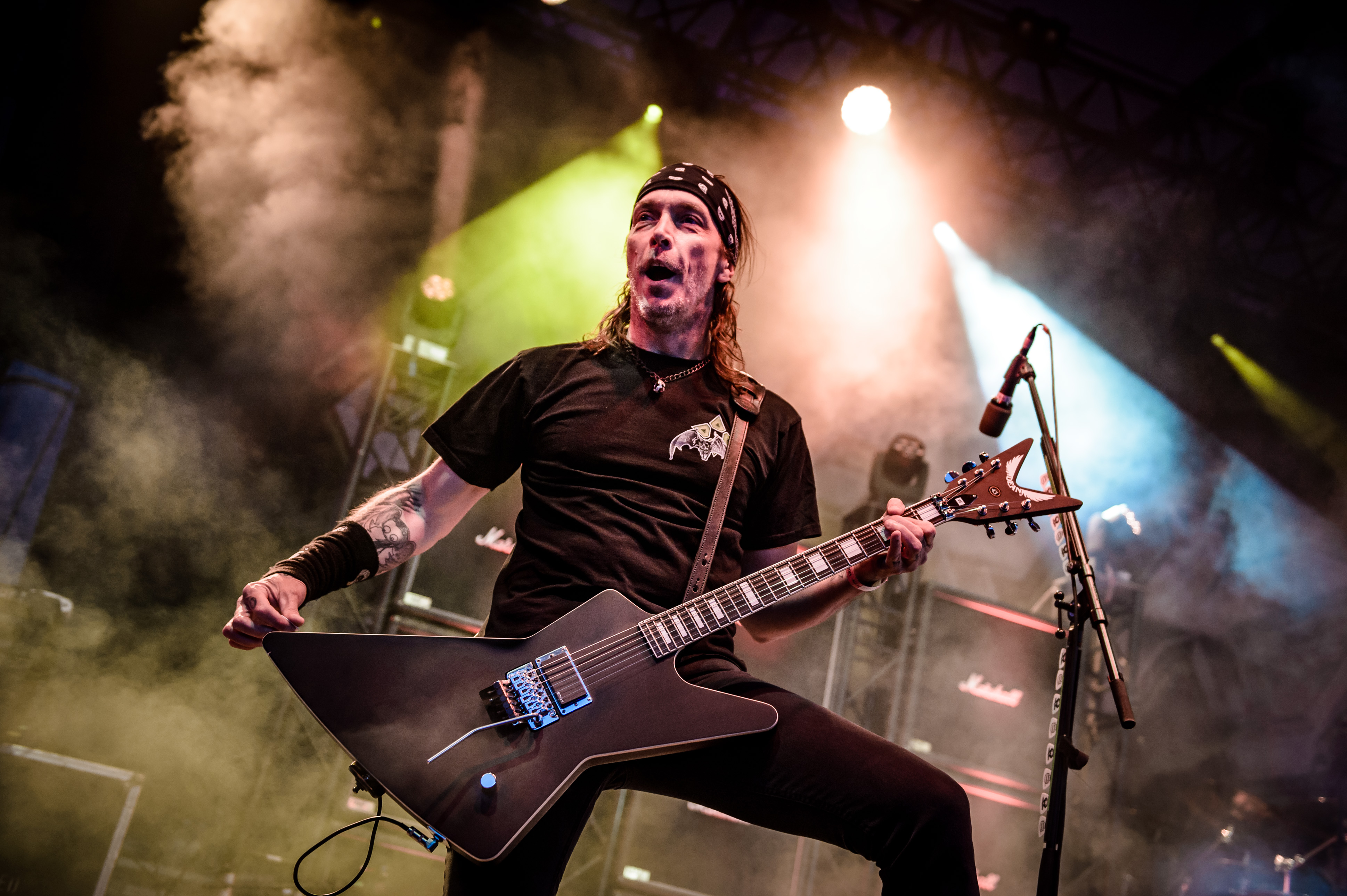 'Rock Hard Festival 2018; Amphitheater Gelsenkirchen': 'Overkill'